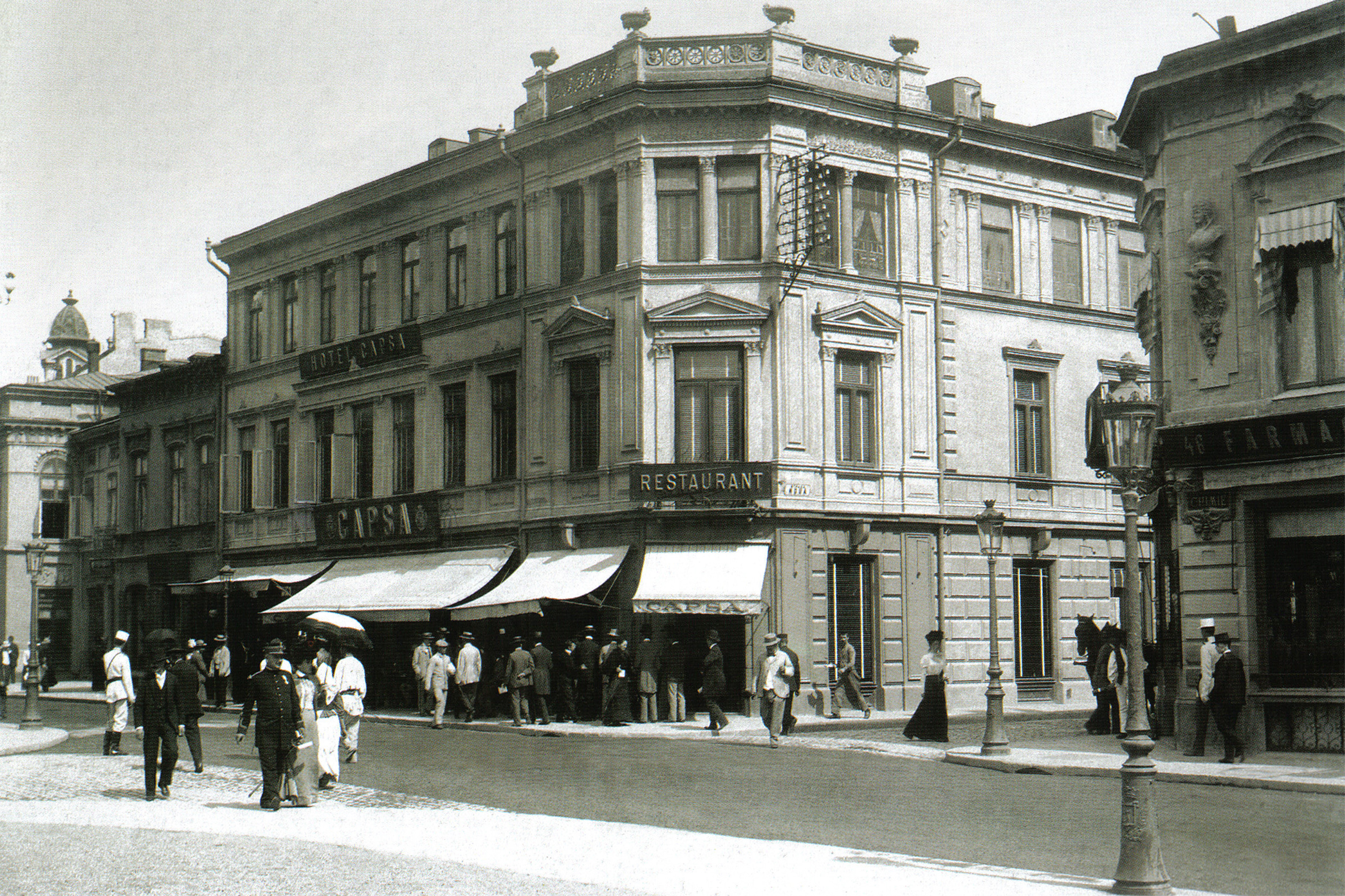 Casa Capşa în anul 1900